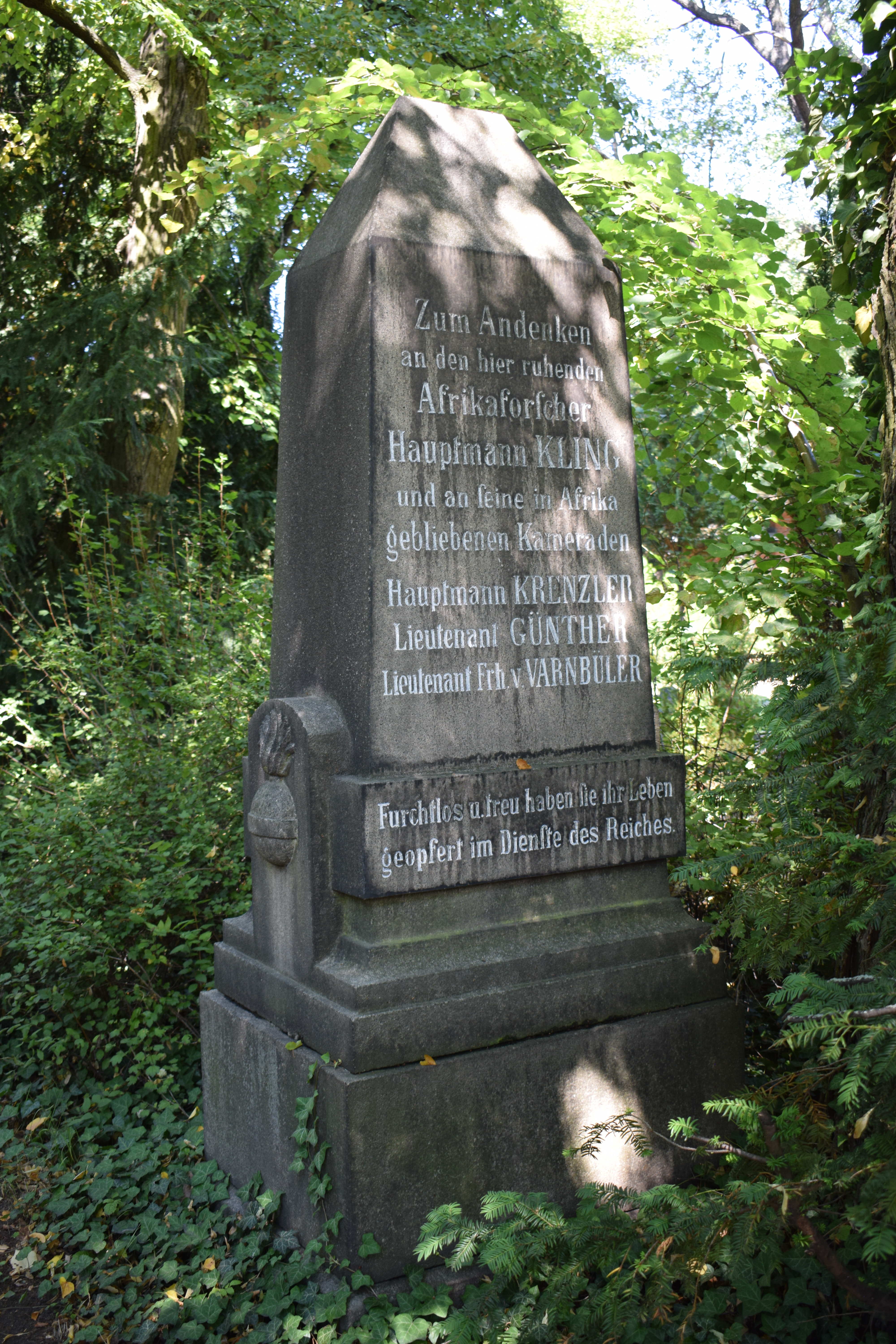 Denkmal von 1894 für den Afrikaforscher Hauptmann Kling und weitere in den deutschen Kolonien in Afrika verstorbene Offiziere auf dem Friedhof Columbiadamm, Berlin.